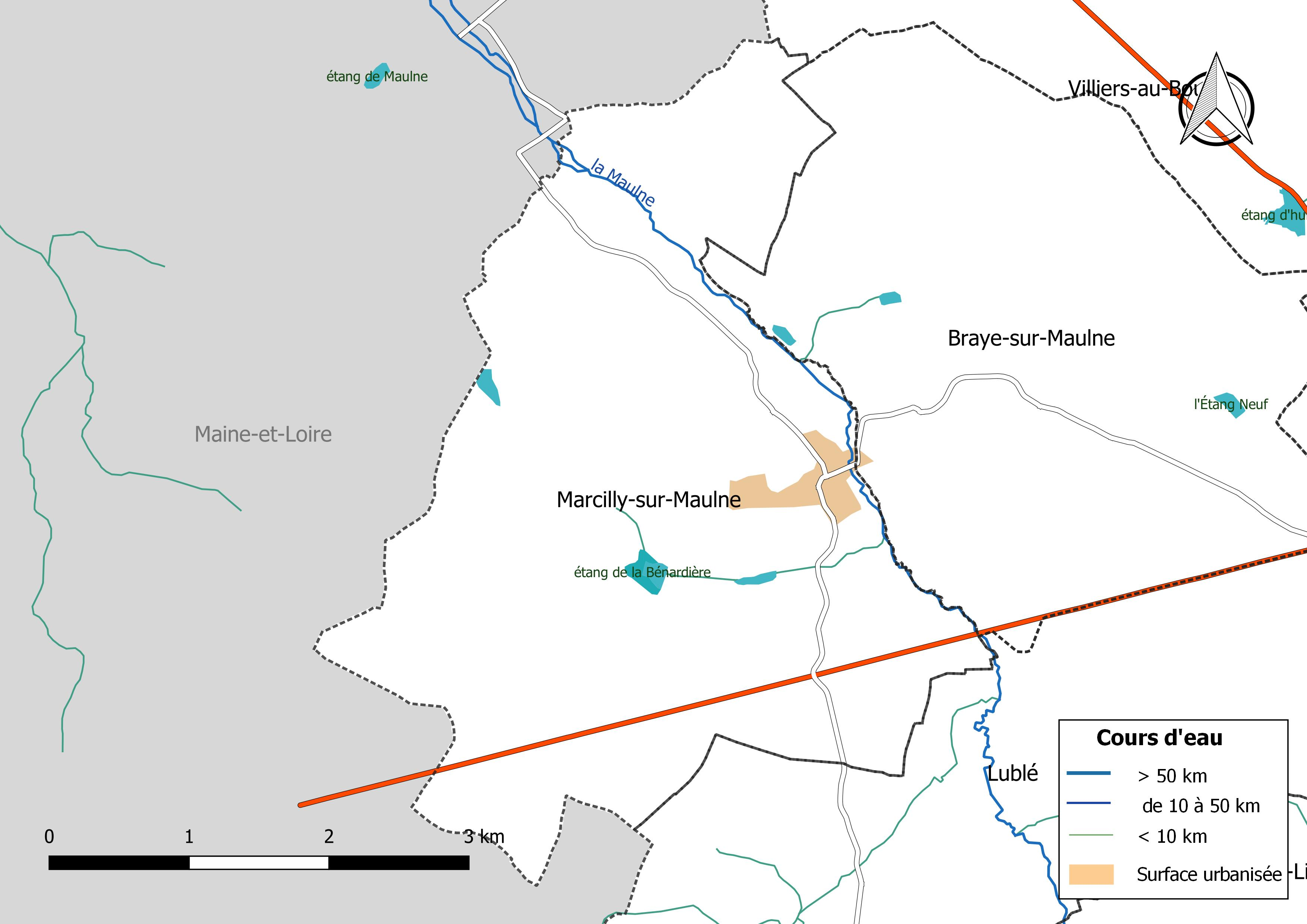 Carte du réseau hydrographique de la commune de Marcilly-sur-Maulne (France).